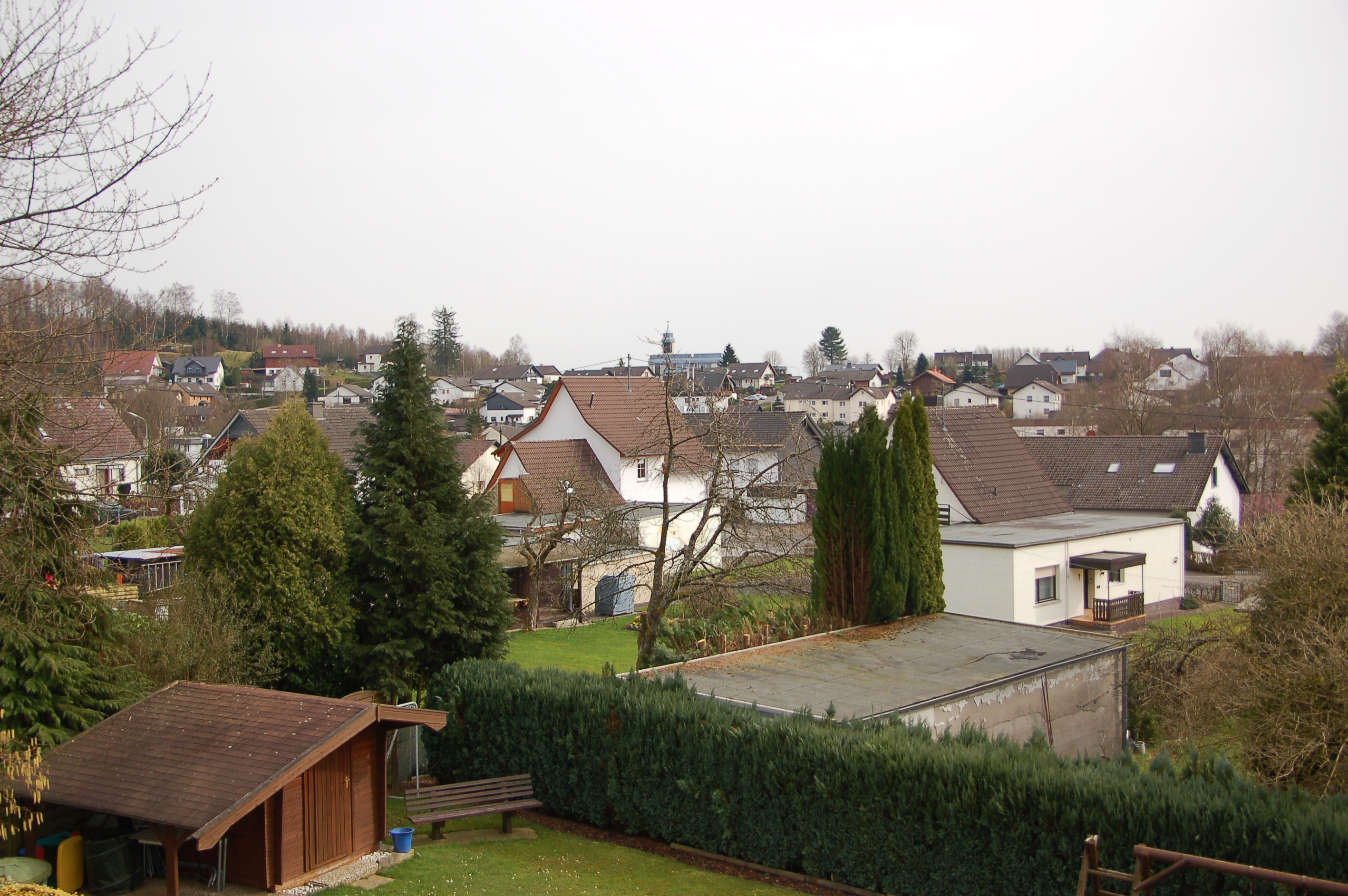 Blick aus der Königsberger Straße über den Hackenberg Richtung Südost